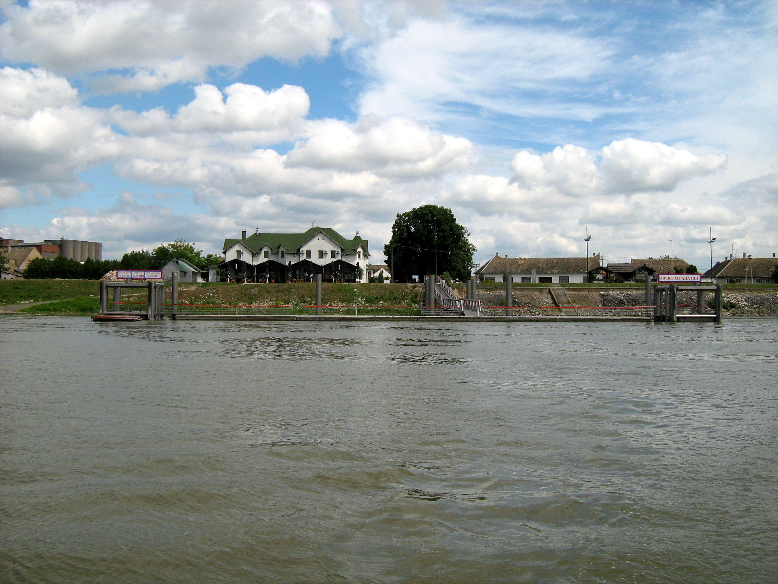 Аутор: Пајкмен